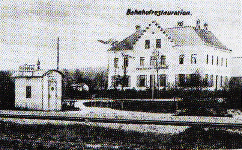 Wellblechhütte und Bahnhofsrestauration des Bahnhofs Riederau auf einer Ansichtskarte aus dem jahr 1902